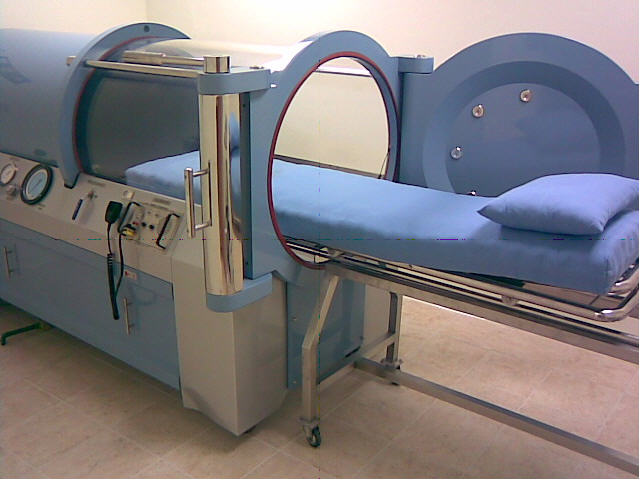 CAMARA HIPERBARICA. ¿Que es la cámara hiperbática? HIPER es un prefijo que indica aumento o exceso, BARI; raíz del griego barys que es peso o presión. Oxigenación hiperbárica significa respirar oxigeno a presiones superiores a la presión atmosférica. La cámara hiperbárica son recintos metálicos de algún otro material resistentes, semejando un submarino capaces de albergar una o mas personas en su interior, donde se alcanza presiones atmosféricas varias veces superiores a la atmósfera ambiental. Existen dos tipos de cámara hiperbárica, que son la monoplaza y la multiplaza. En la actualidad, la medicina moderna a dado un nuevo giro en busca de recuperar la salud de los pacientes, y ahora emplea elementos que siempre han existido en nuestro ambiente destacando el oxigeno. La oxigenación hiperbárica (OHB) dentro de la cámara se crea un ambiente de atmósfera negativa simulando de 1.5 a 3 atmósferas absolutas (ATA) lo que equivale a soportar la presión del agua en profundidad de 5 a 20 metros. Se administra oxigeno 100% puro durante una hora, alcanzando saturaciones de oxigeno en tejidos hasta un 400% mas de lo normal, esto conlleva a mas de 120 reacciones bioquímicas en el cuerpo humano ayudando de esta manera a un sin fin de padecimientos o enfermedades un ejemplo de ellas son el pie diabético, ulceras varicosas, derrame cerebral, parkinson, alzeheimer, artritis reumatoide, estrés, embolias de todo tipo entre algunas enfermedades mas; también se maneja para tratamiento estético; la OHB va acortando el tiempo de recuperación de las mismas hasta su curación. Ya existen médicos especialistas en esta área, quienes son los que determinan si un paciente es candidato o no a esta terapia.